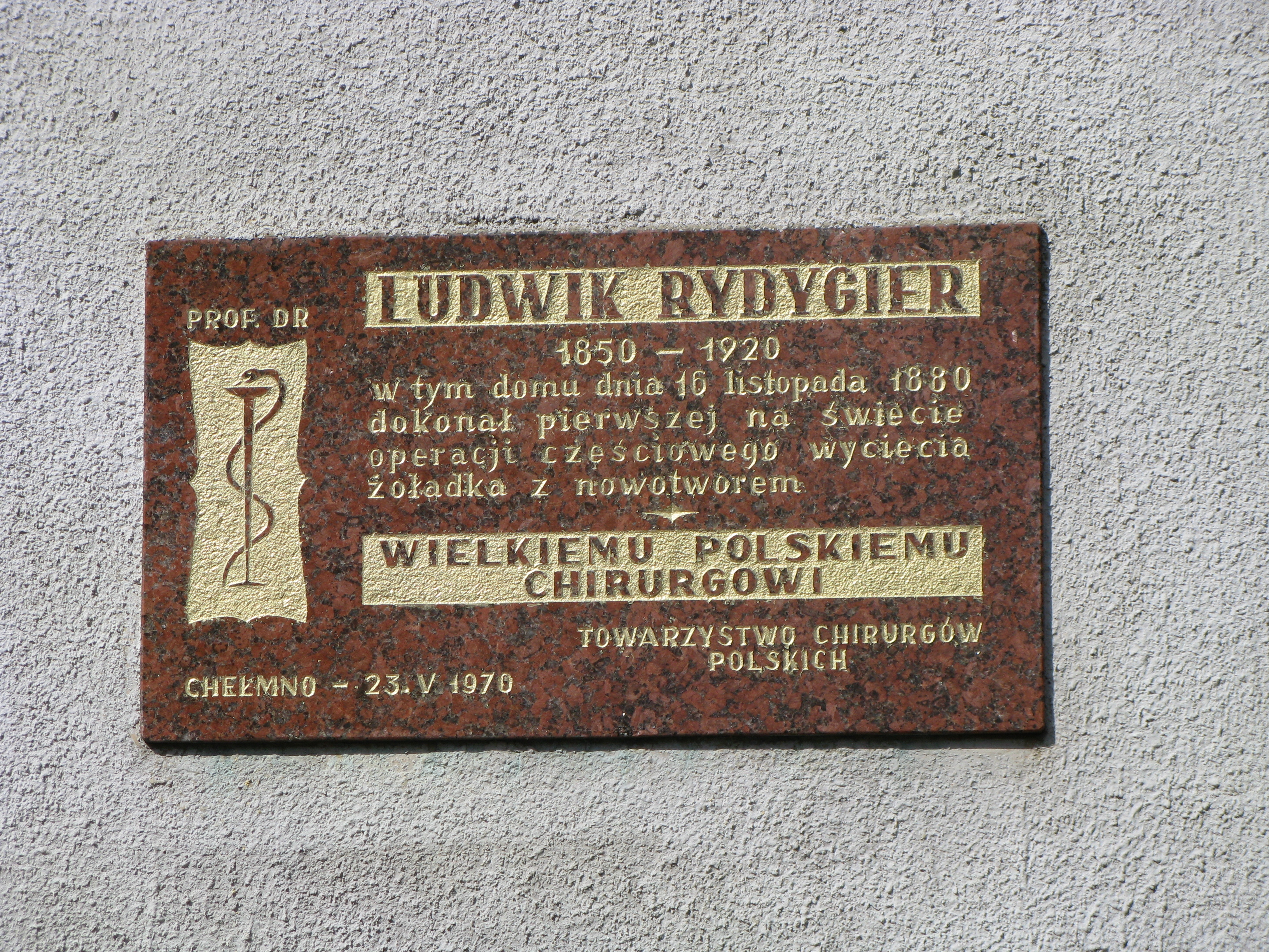 Ludwik Rydygier plaque in Chełmno